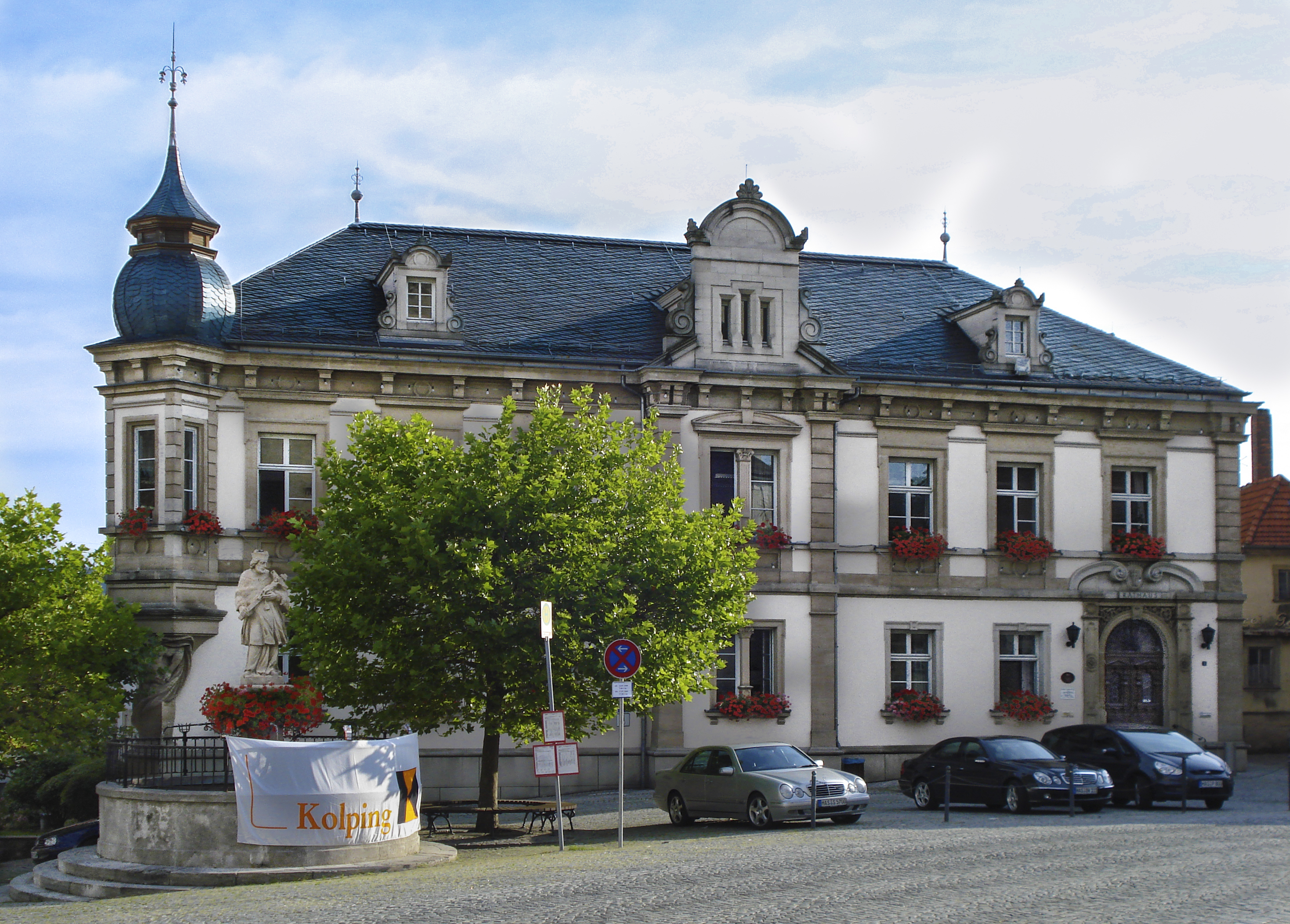 Rathaus, Stadt Eltmann, Landkreis Haßberge, Bayern